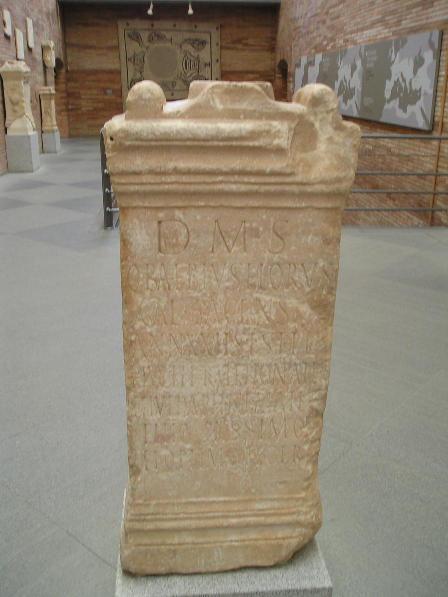 Inscripción funeraria romana procedente de Mérida (Badajoz, España) conservada en el Museo Nacional de Arte Romano de la localidad, correspondiente con CIL II 516 = EE VIII 362: D(is) M(anibus) s(acrum) / Q(uintus) Baebius Florus / Gal(eria) Pacensi[s] / ann(orum) XX h(ic) s(itus) e(st) s(it) t(ibi) t(erra) l(evis) / P(ublius) Iul(ius) Hermetion pater / et Iul(ia) Daphne mater / filio piissimo / et optimo fecer(unt)